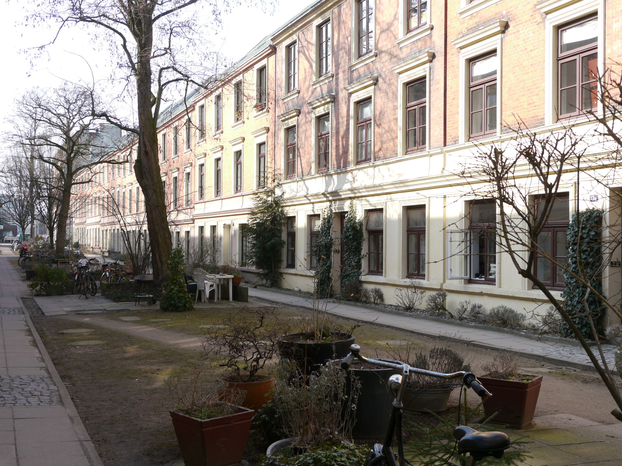 Terassenhäuser im Falkenried